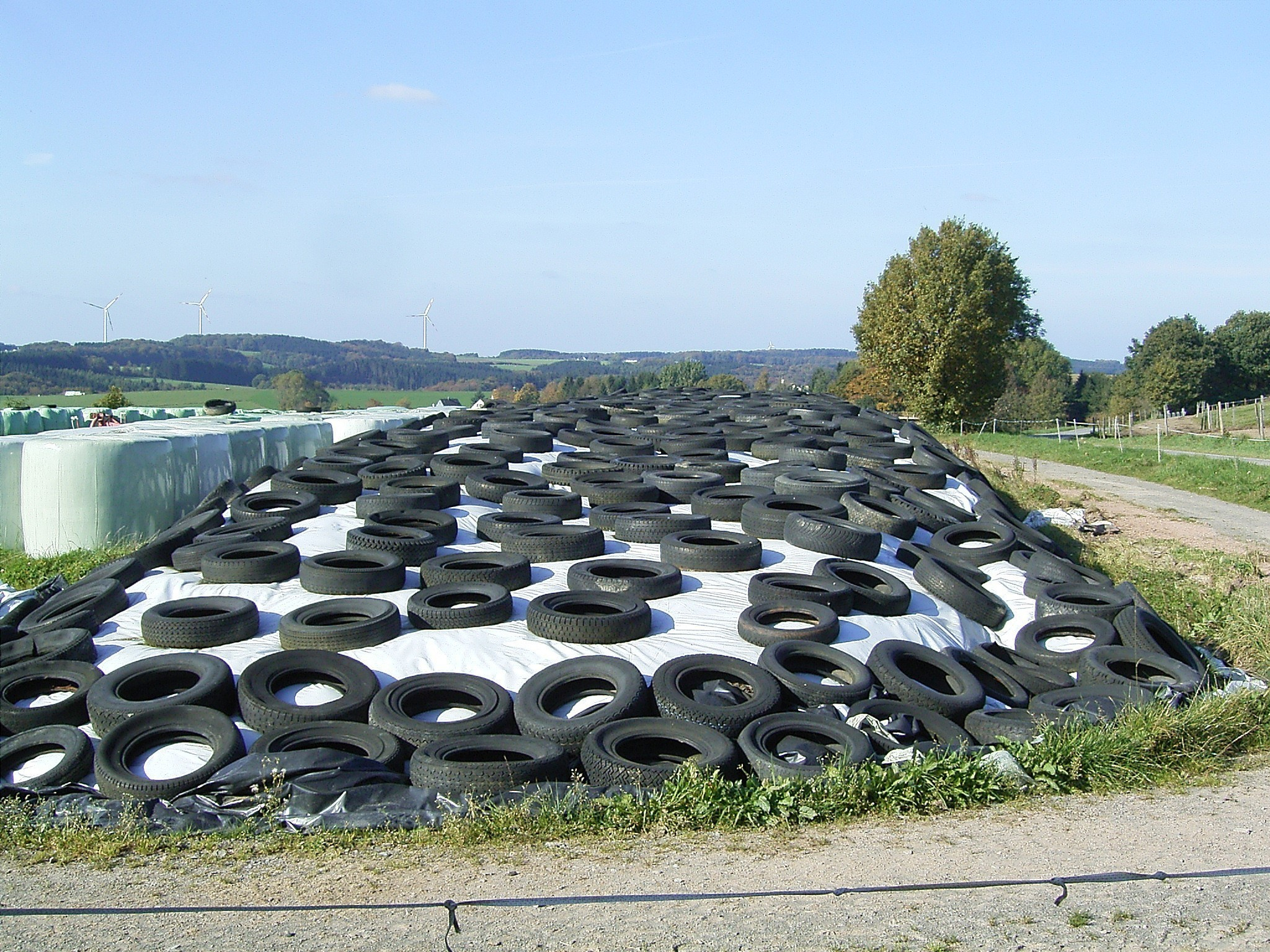 Gedecktes Fahrsilo und Silageballen (links) in Radevormwald-Borbeck